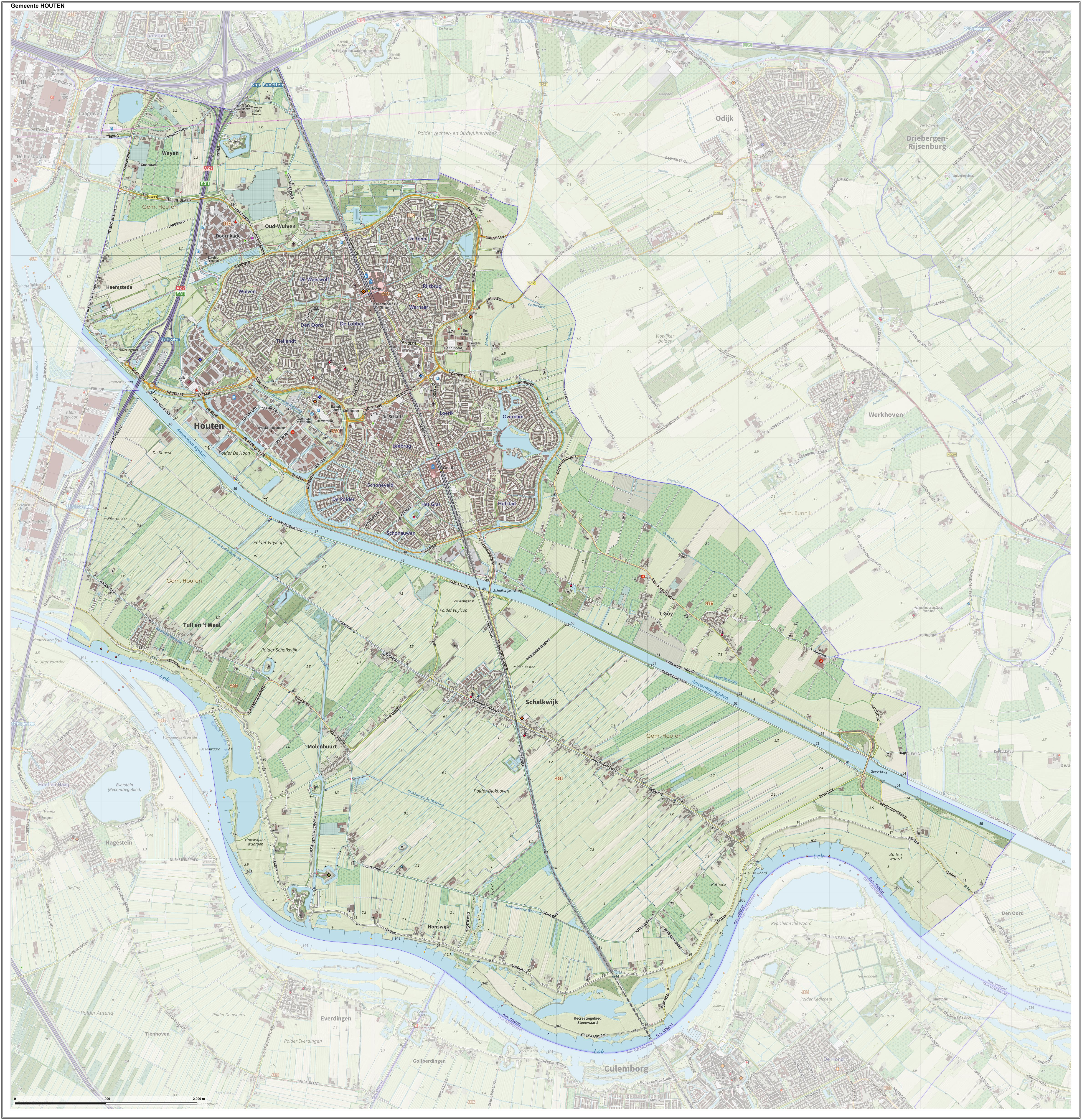 Topografische gemeentekaart. Resolutie: 400 pixels/km. Kaartbeeld samengesteld uit de open geodata van de Top10NL en Top25namen (Kadaster), Creative Commons-BY licentie. Gebouwvlakken uit open geodata BAG extract. Wegen uit de OpenStreetMap, OpenStreetMap community. Reliëfschaduw uit de Actuele Hoogtekaart AHN2. Samenstelling en kleurenschema: Jan-Willem van Aalst, met QGIS. Zie ook de Legenda.